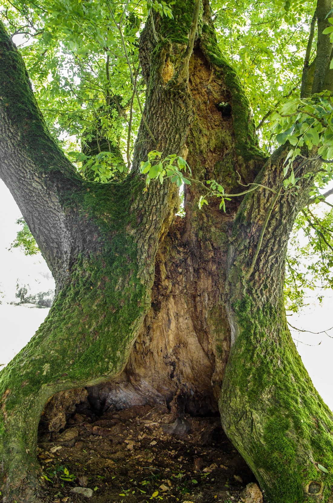 památný strom Jasan v bývalé Dolní Vsi, okres Sokolov